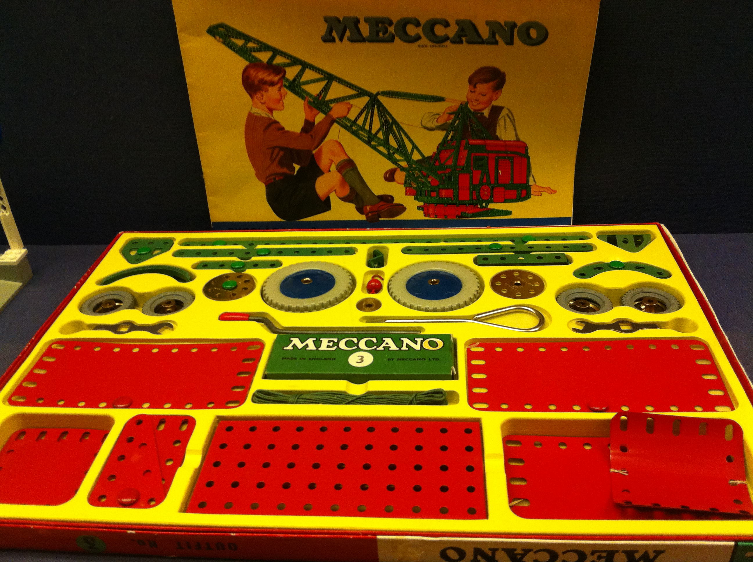 Meccano parts